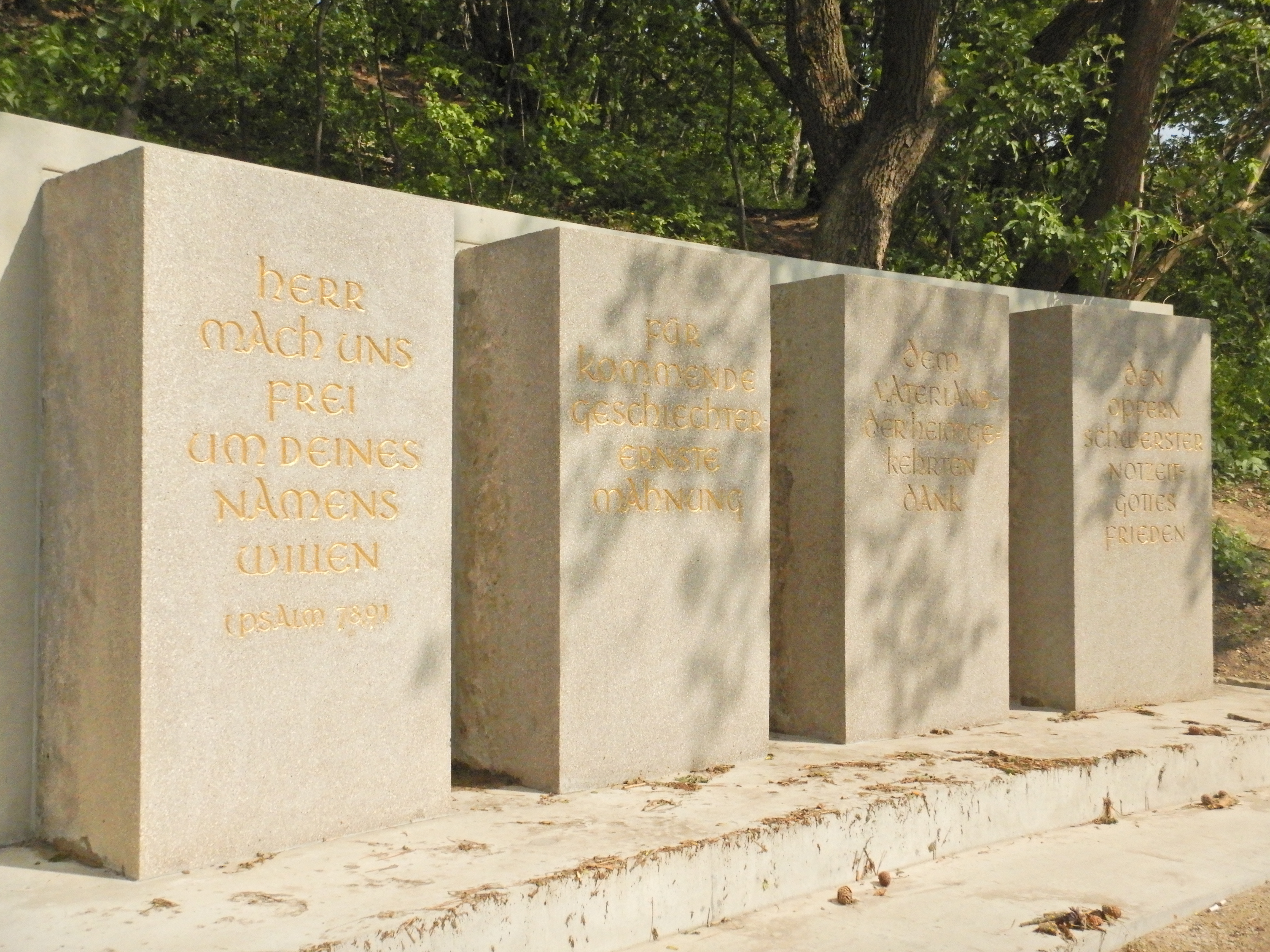 Heimkehrer-Denkmal (neu)